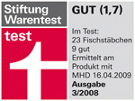 Logo zur Werbung mit Ergebnissen von test der Stiftung Warentest, Querformat, schmal